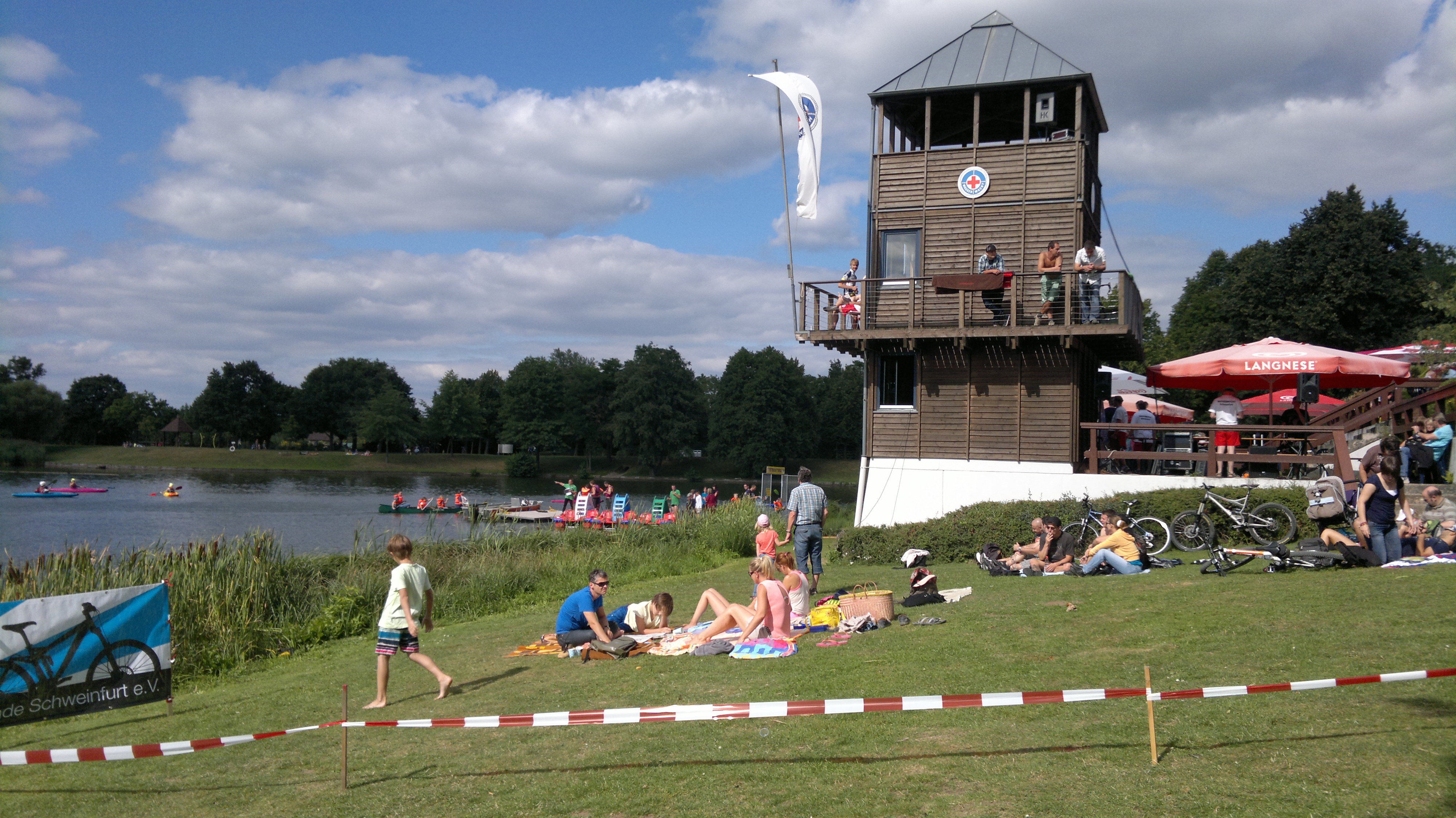 Schweinfurt, Germany